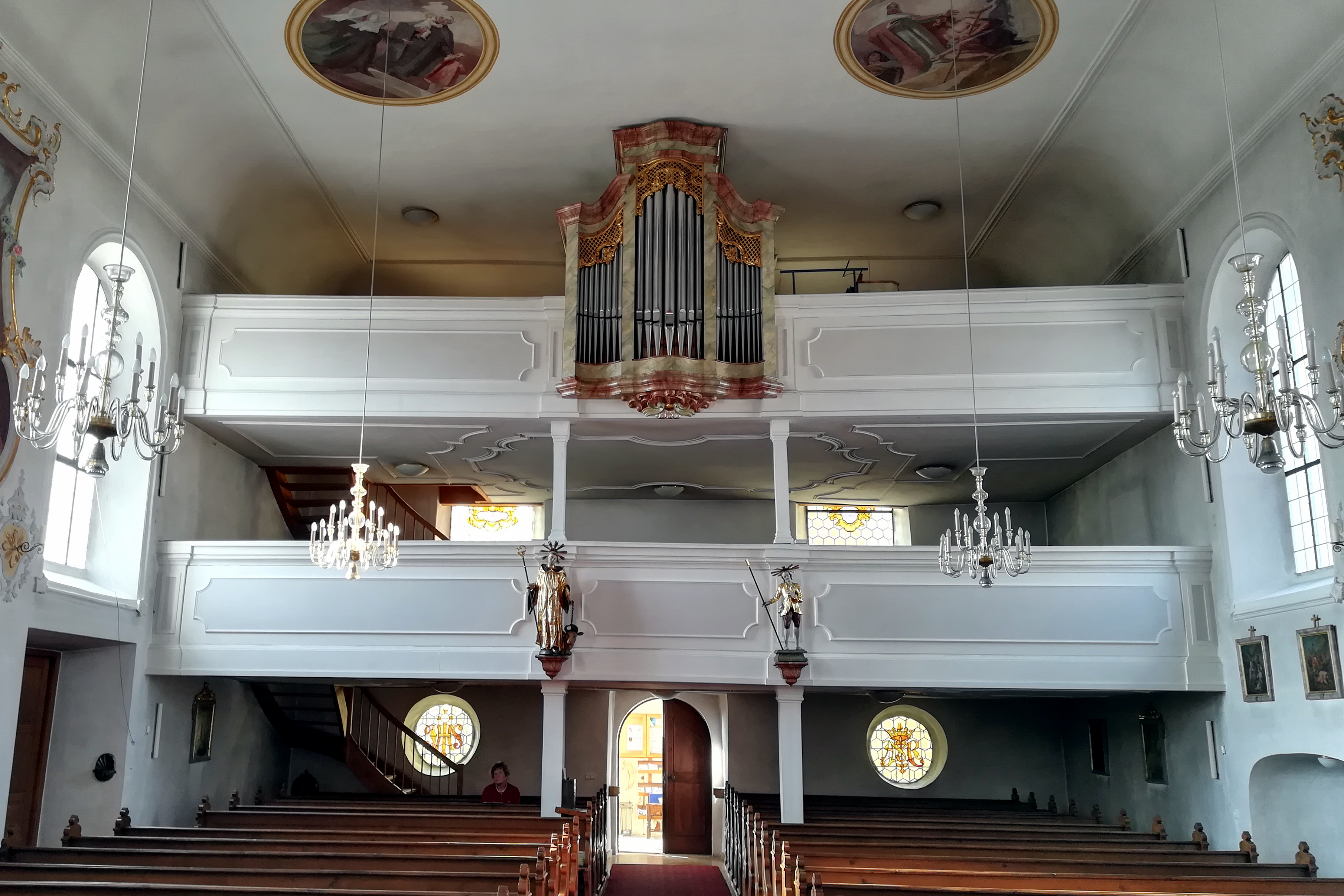 St. Mauritius ist die römisch-katholische Pfarrkirche von Mintraching im Oberpfälzer Landkreis Regensburg.